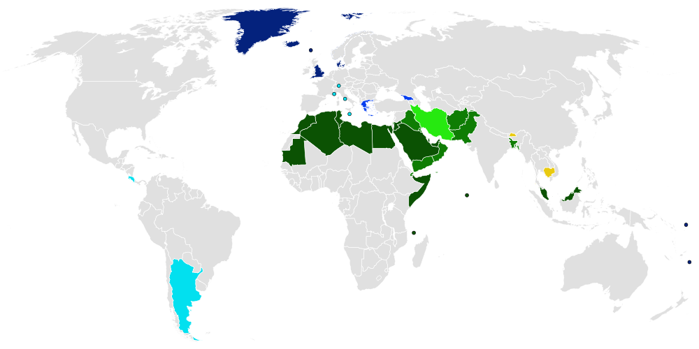 Countries with state religions marked with colour